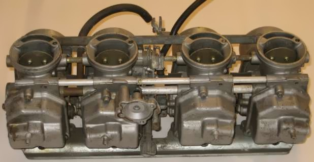 Honda CB 750 CB750 Keihin Carb